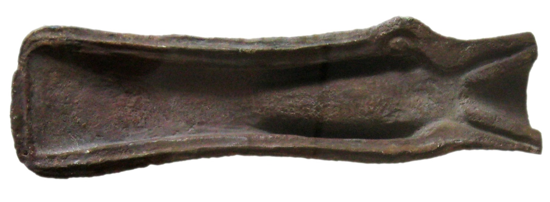 Gussform für ein Tüllenbeil im Pachtener Museum.